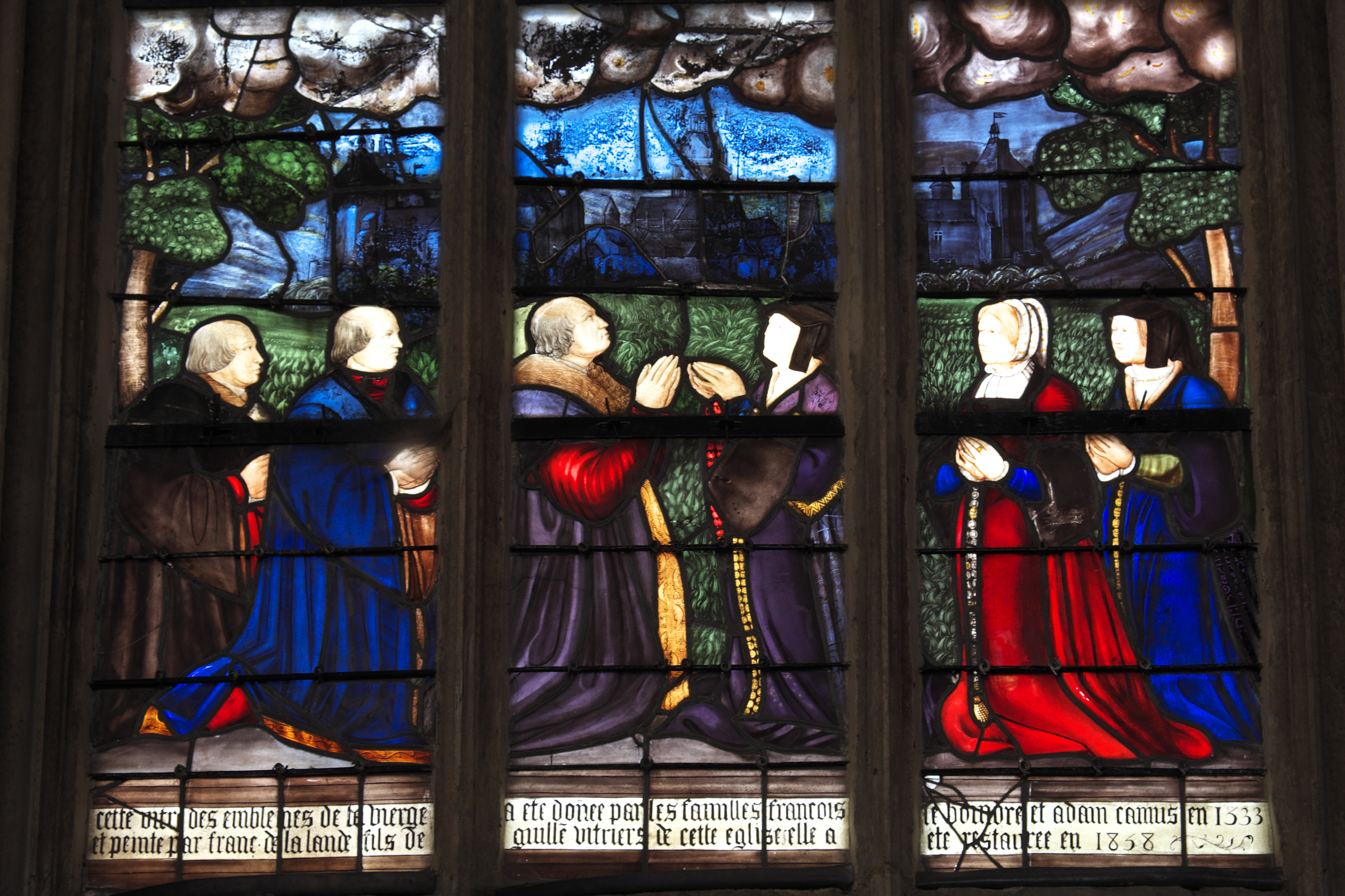 Katholische Pfarrkirche Notre-Dame-des-Marais in La Ferté-Bernard im Département Sarthe (Pays de la Loire/Frankreich), Bleiglasfenster (baie 4) aus der ersten Hälfte des 16. Jahrhunderts, 1858 von Léopold Charles restauriert und ergänzt; Darstellung: Mariensymbole, Stifter (Ausschnitt)